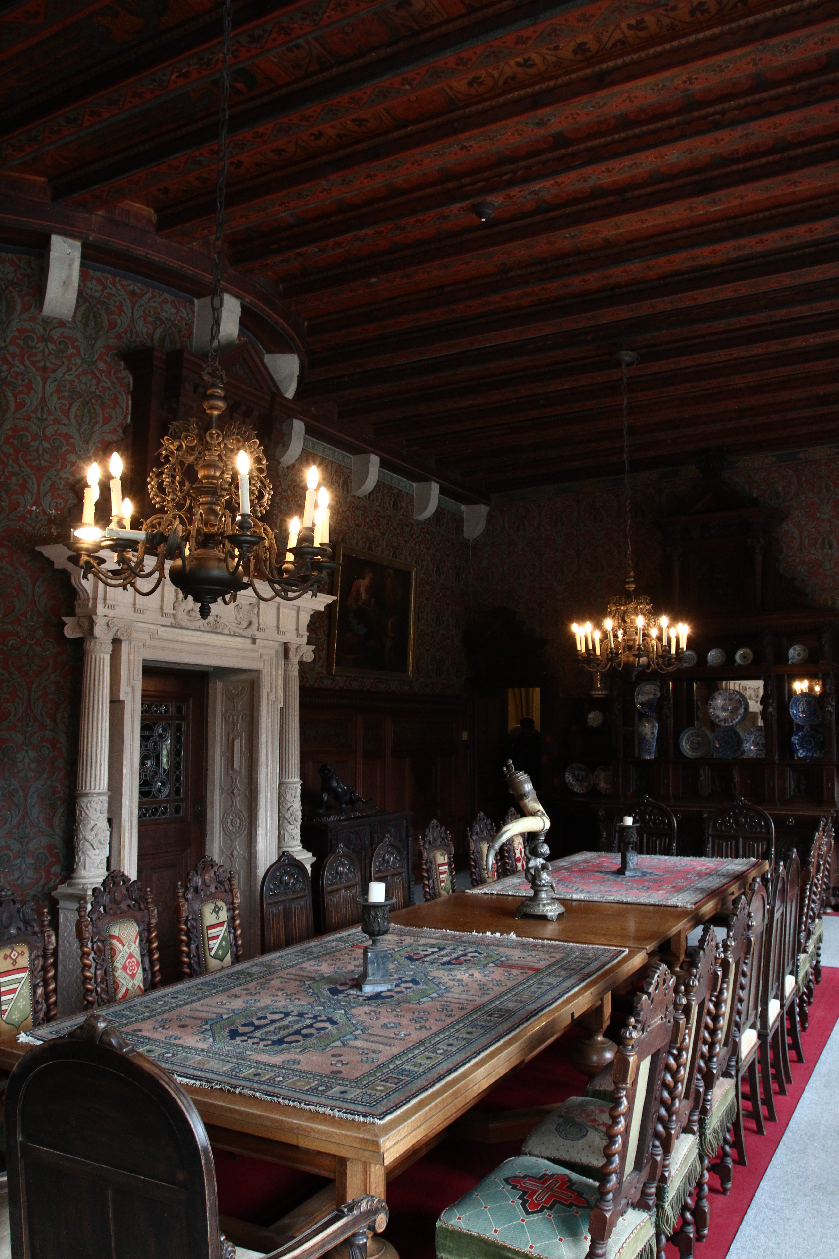 Столовая, замок Райхсбург